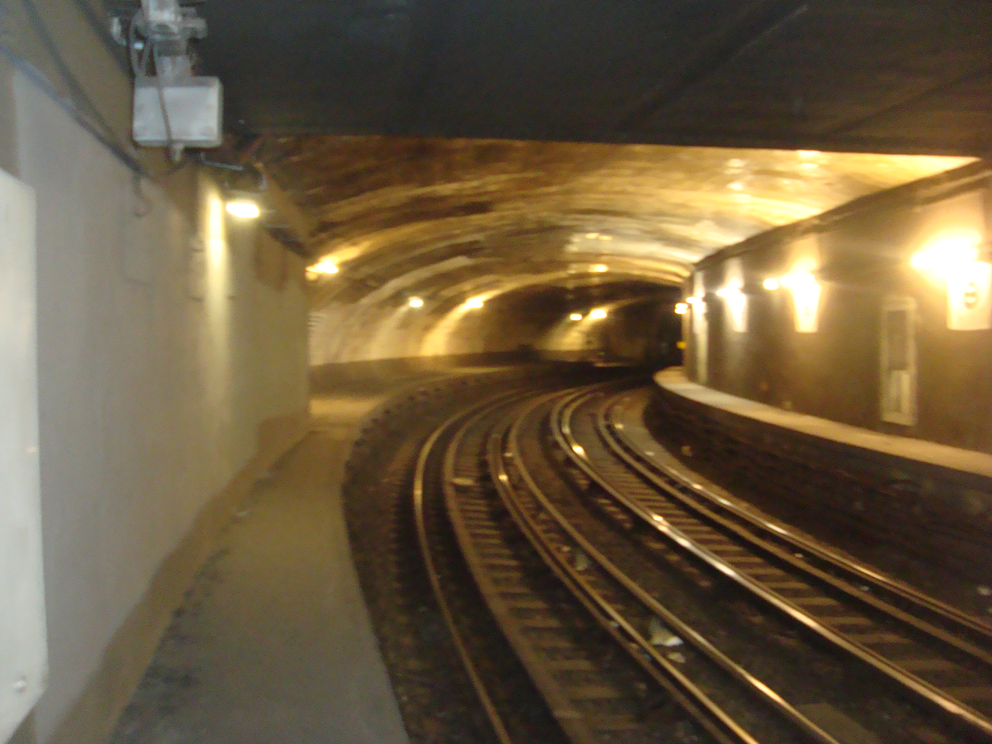 Station Victor Hugo de la ligne 2 du métro de Paris, France. Les quais de l'ancienne station en courbe abandonnée.